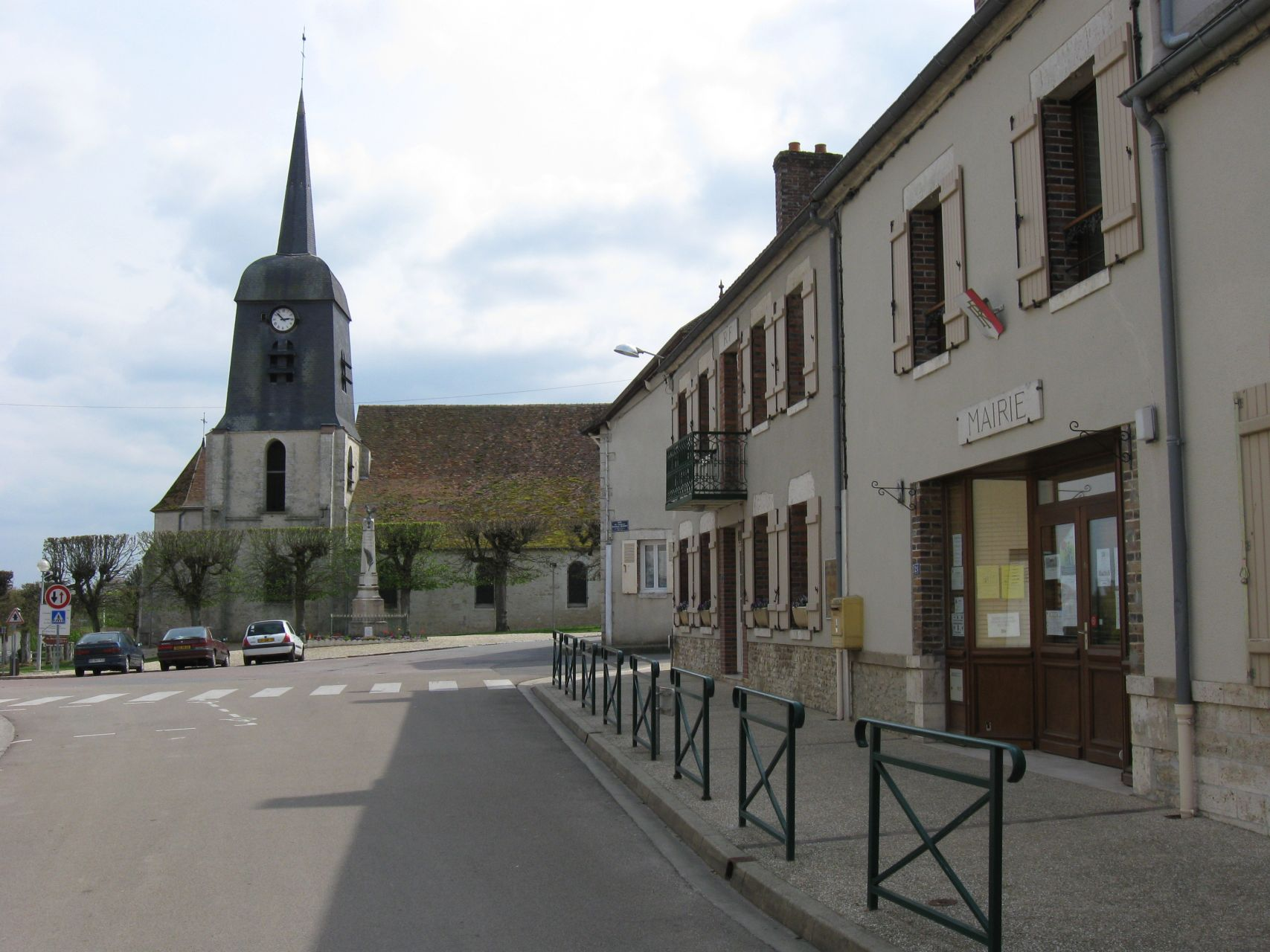 Nargis, mairie et église Saint-Germain (Loiret , région Centre)